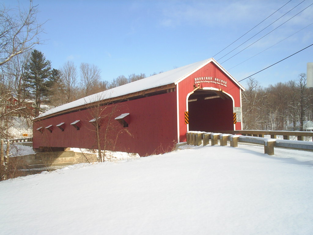 Buskirk Covered Bridge